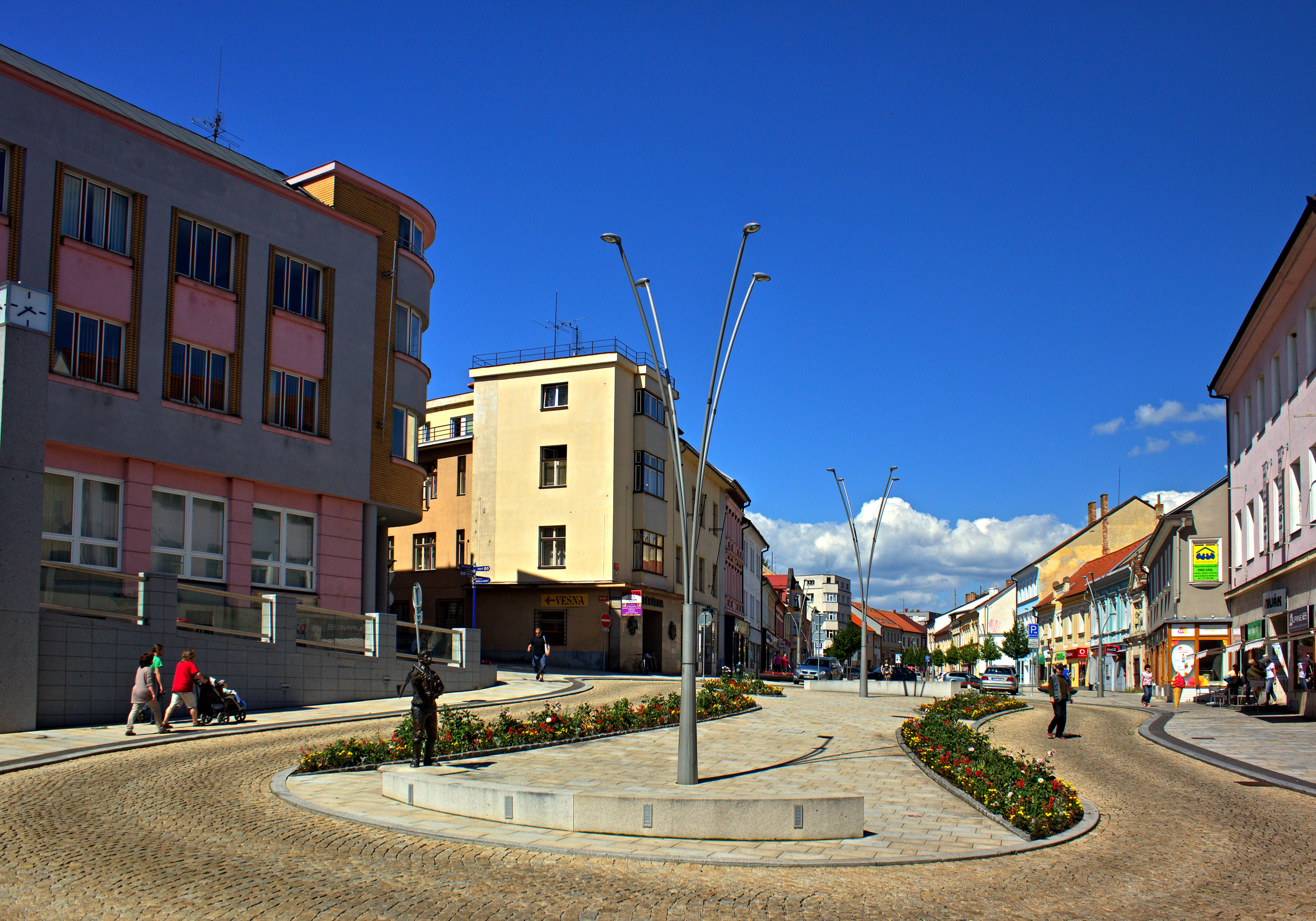 Velké náměstí, Strakonice